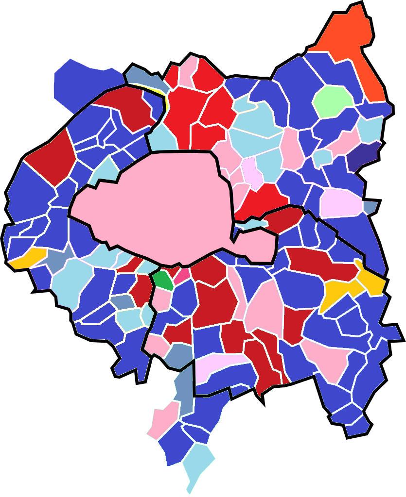 Carte des couleurs politiques des 131 Maires des Communes membres du Grand Paris Parti communiste français : 6 maires Ensemble ! : 1 maire Front de gauche : 15 maires Europe Écologie Les Verts : 1 maire Parti écologiste : 1 maire Mouvement républicain et citoyen : 1 maire Parti socialiste : 15 maires Divers gauche : 2 maires Sans étiquette : 1 maire Mouvement démocrate : 3 maires Union des démocrates et indépendants : 18 maires Divers droite : 5 maires Les Républicains : 61 maires Parti chrétien-démocrate : 1 maire